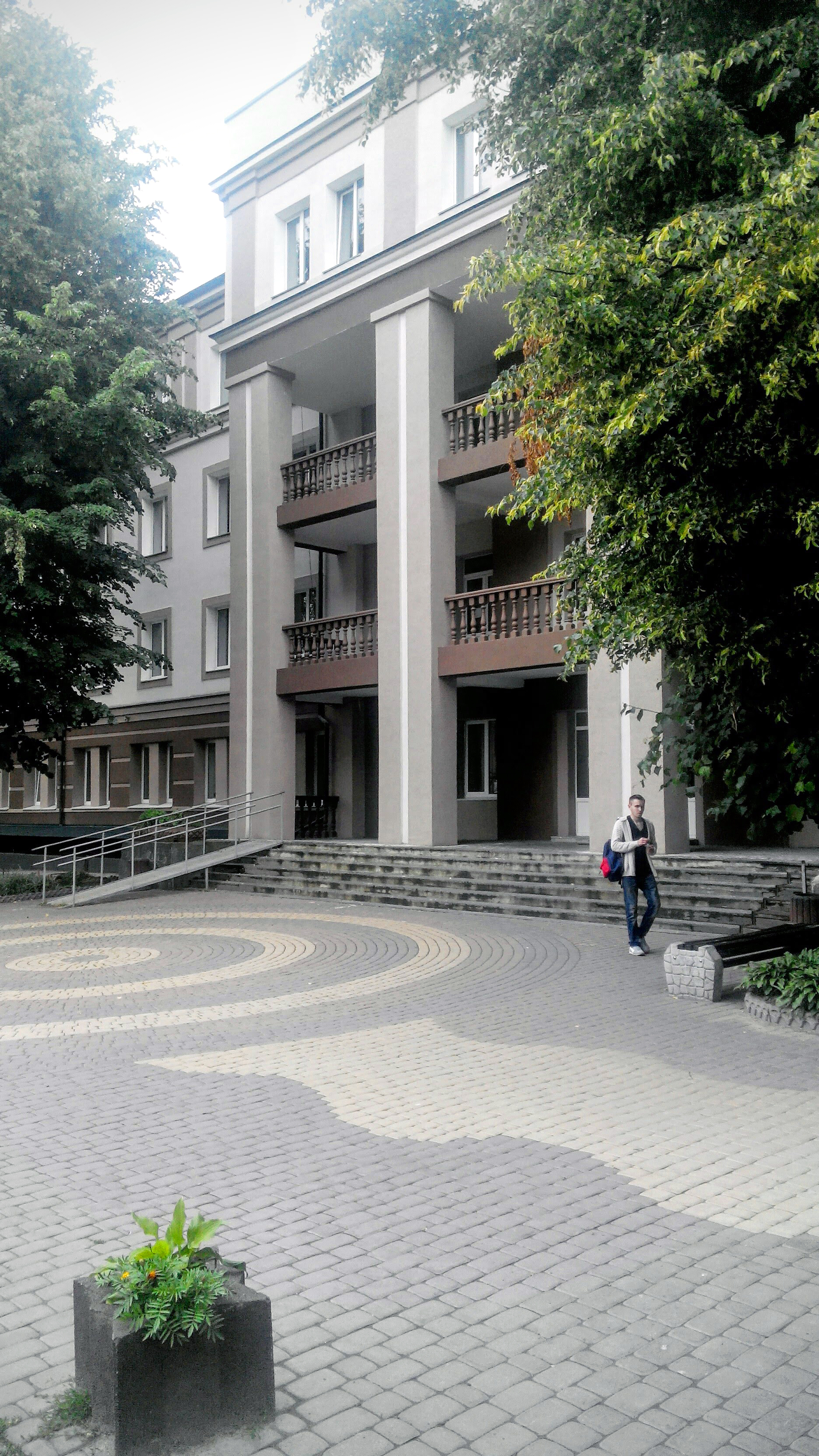 Корпус ВНМУ по вулиці В.Стуса